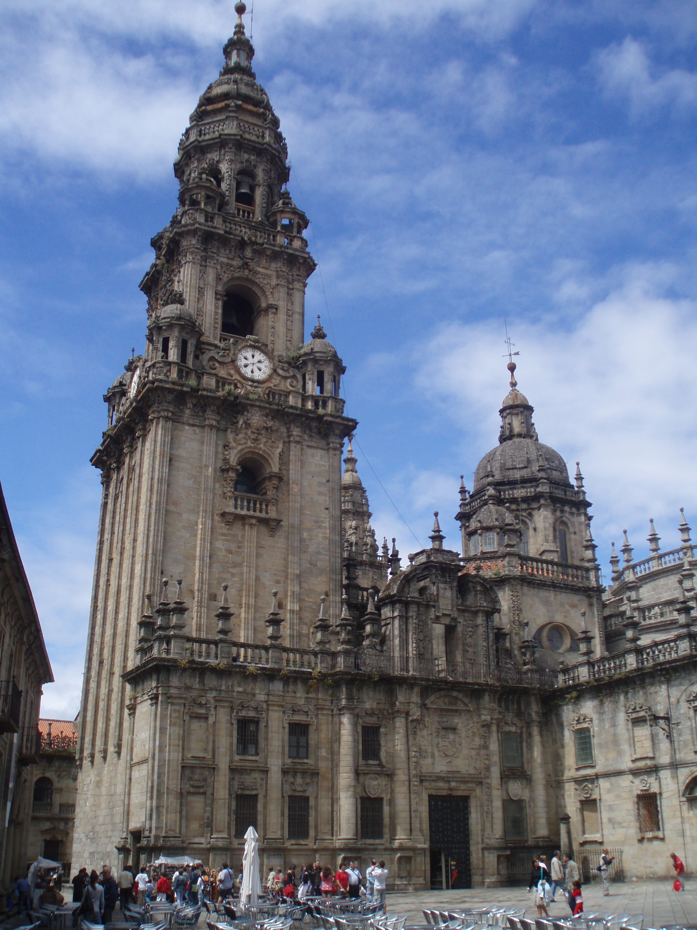 Torre del reloj de la Catedral de Santiago de Compostela.